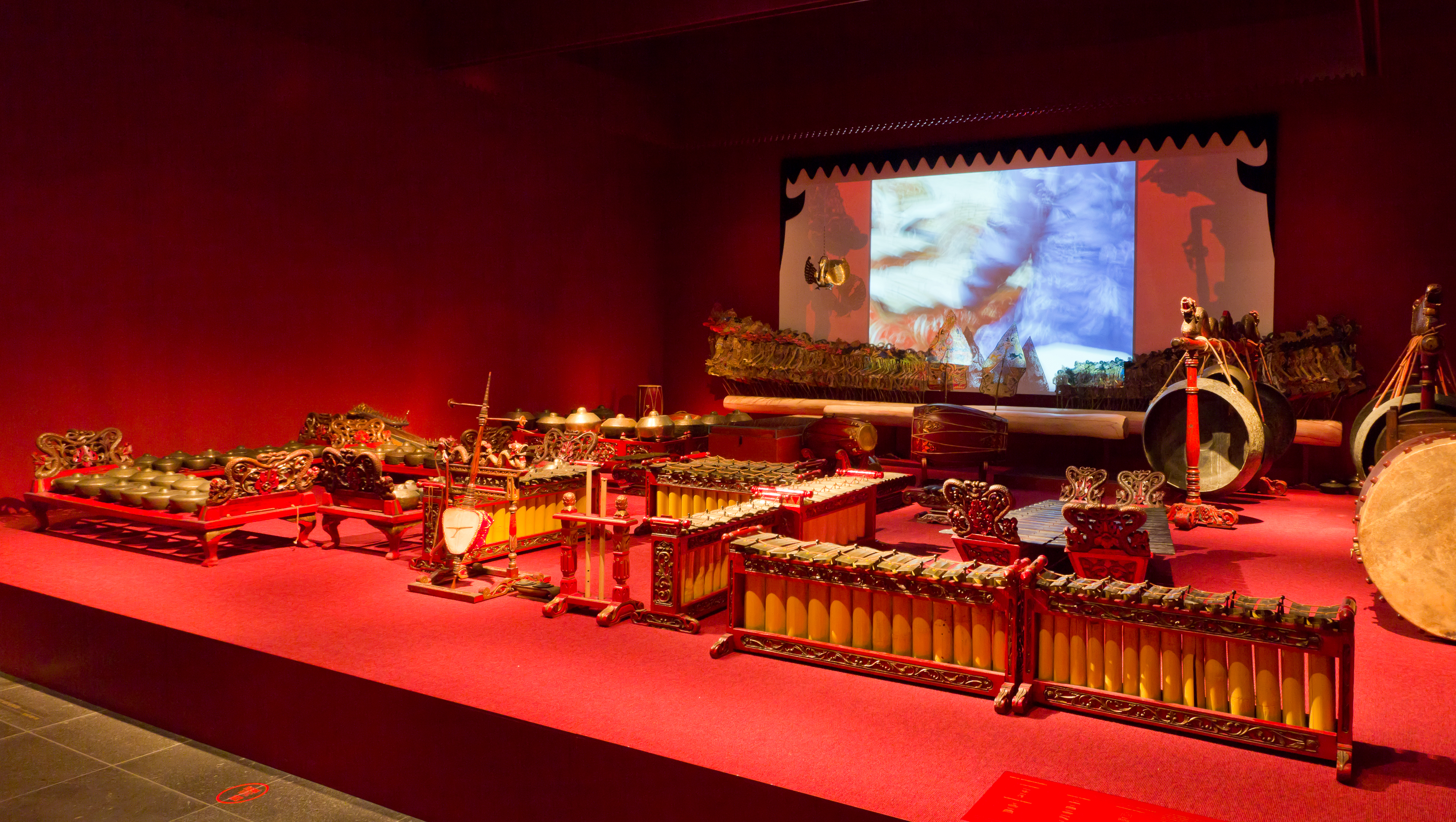 Gamelan Instrumentenensemble, Zentraljava, Indonesien, Südostasien